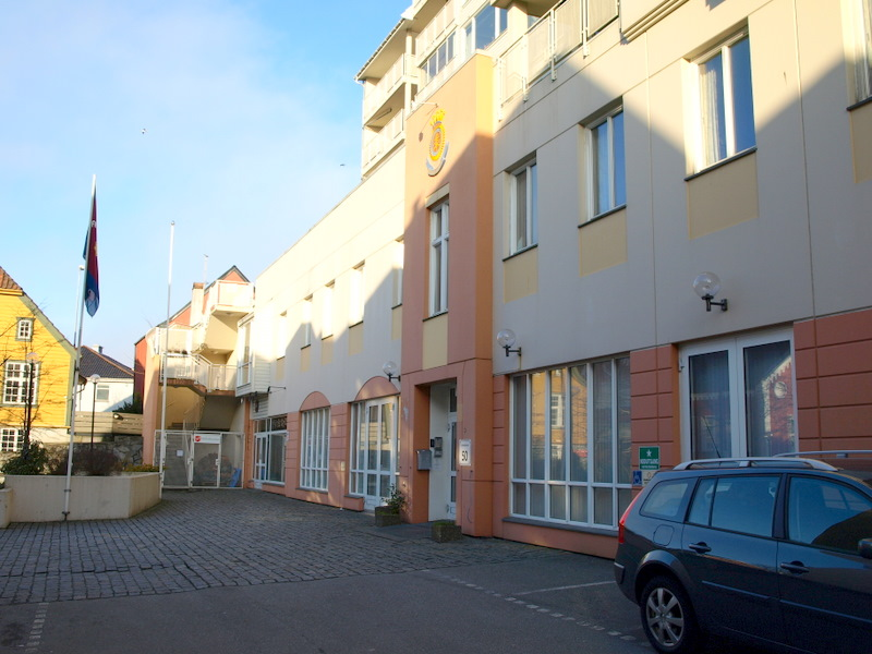 Frelsesarmeen Stavanger